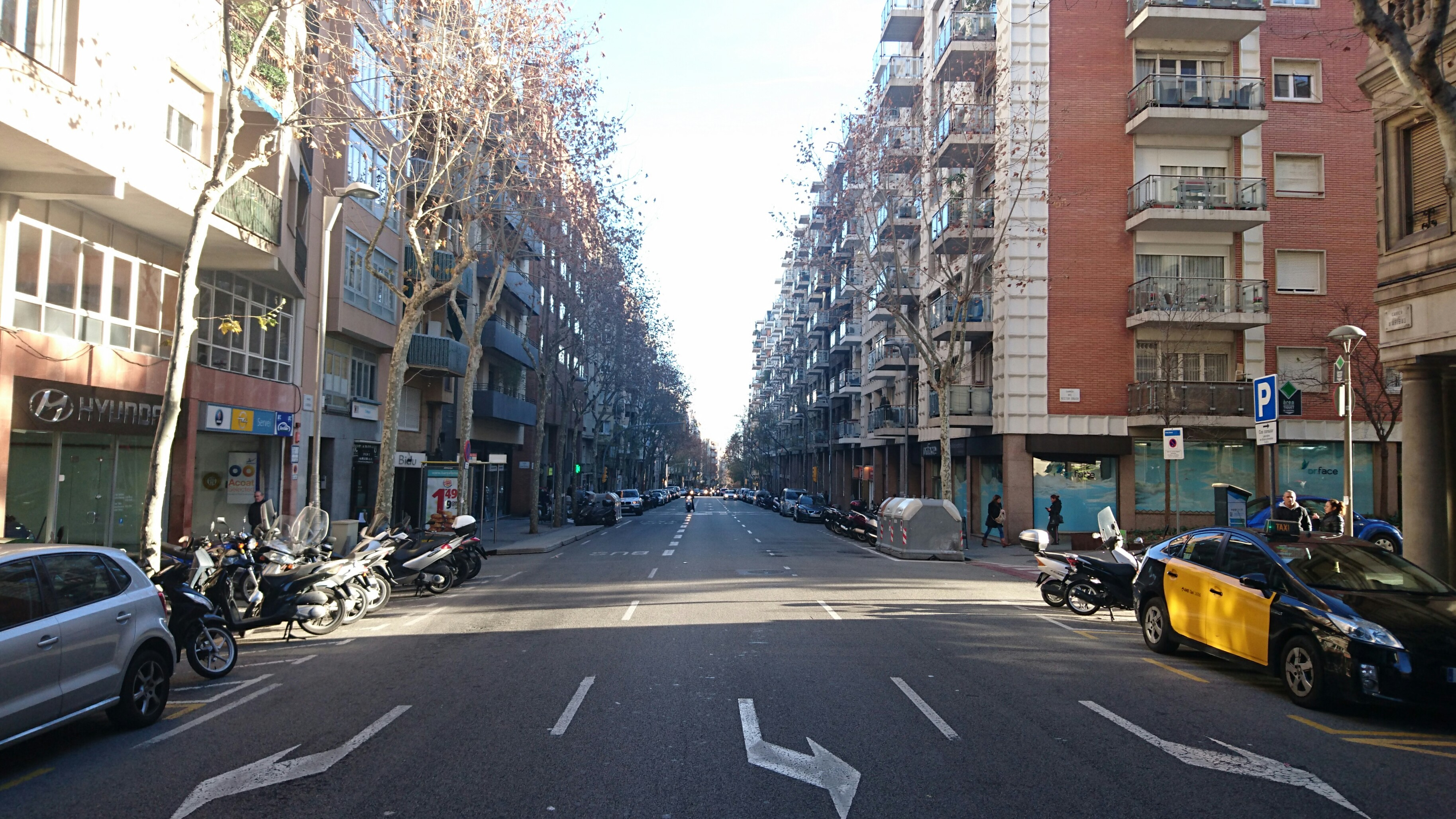 El carrer d'Aribau, des del tram final, a la Via Augusta, al barri de Sant Gervasi - Galvany de Barcelona (Països Catalans)